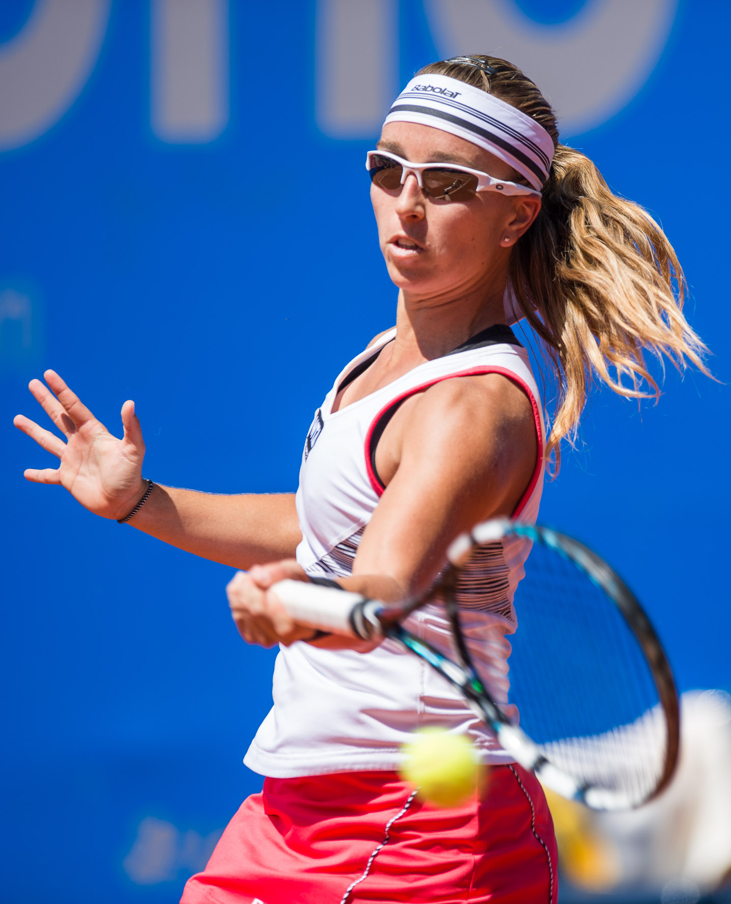 Beatriz Garcia Vidagany,Beatriz García Vidagany,Damentennis,Nürnberger Versicherungscup 2014,Tennis,WTA